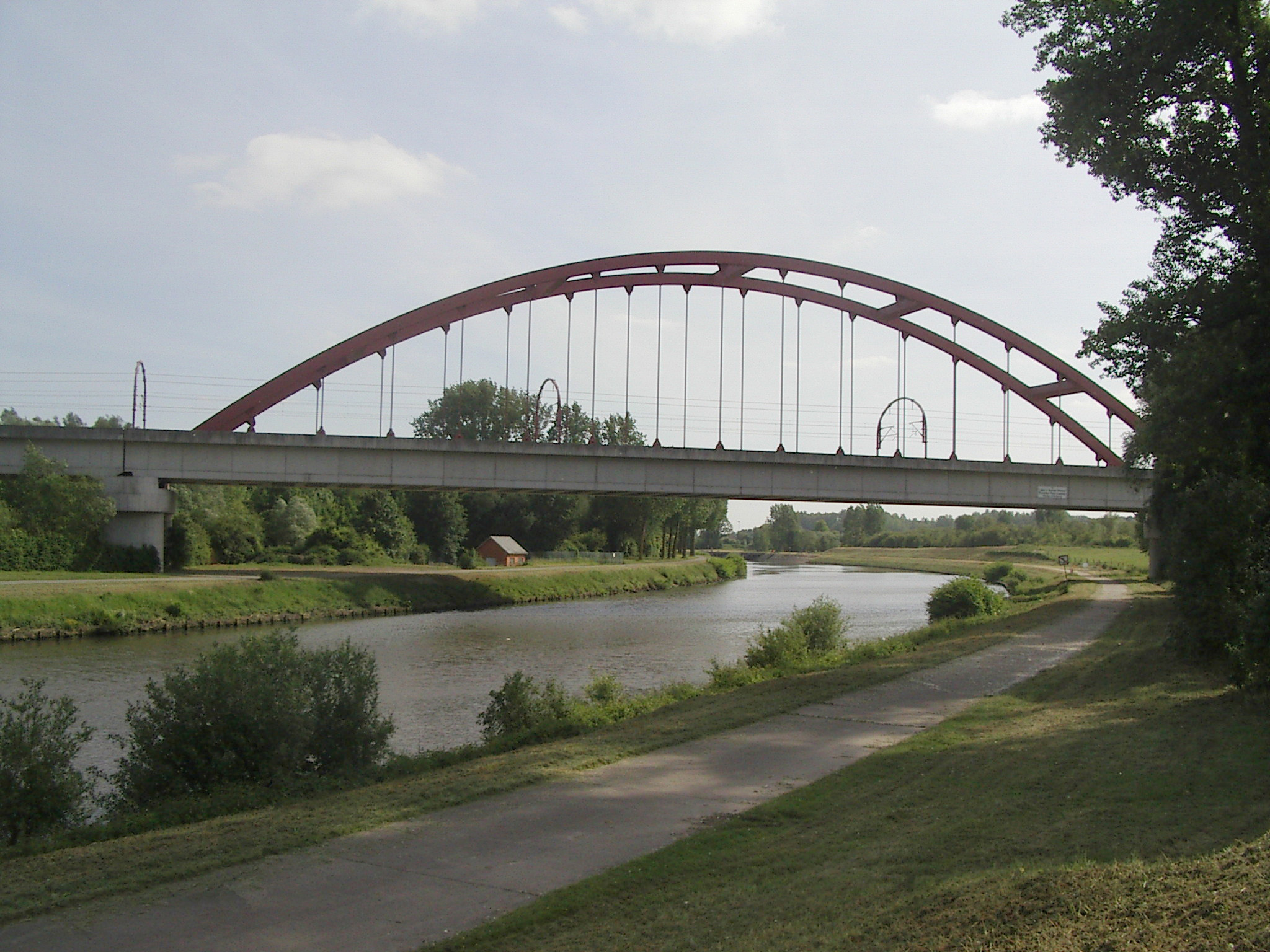 Viaduc du TGV à Antoing (Belgique)